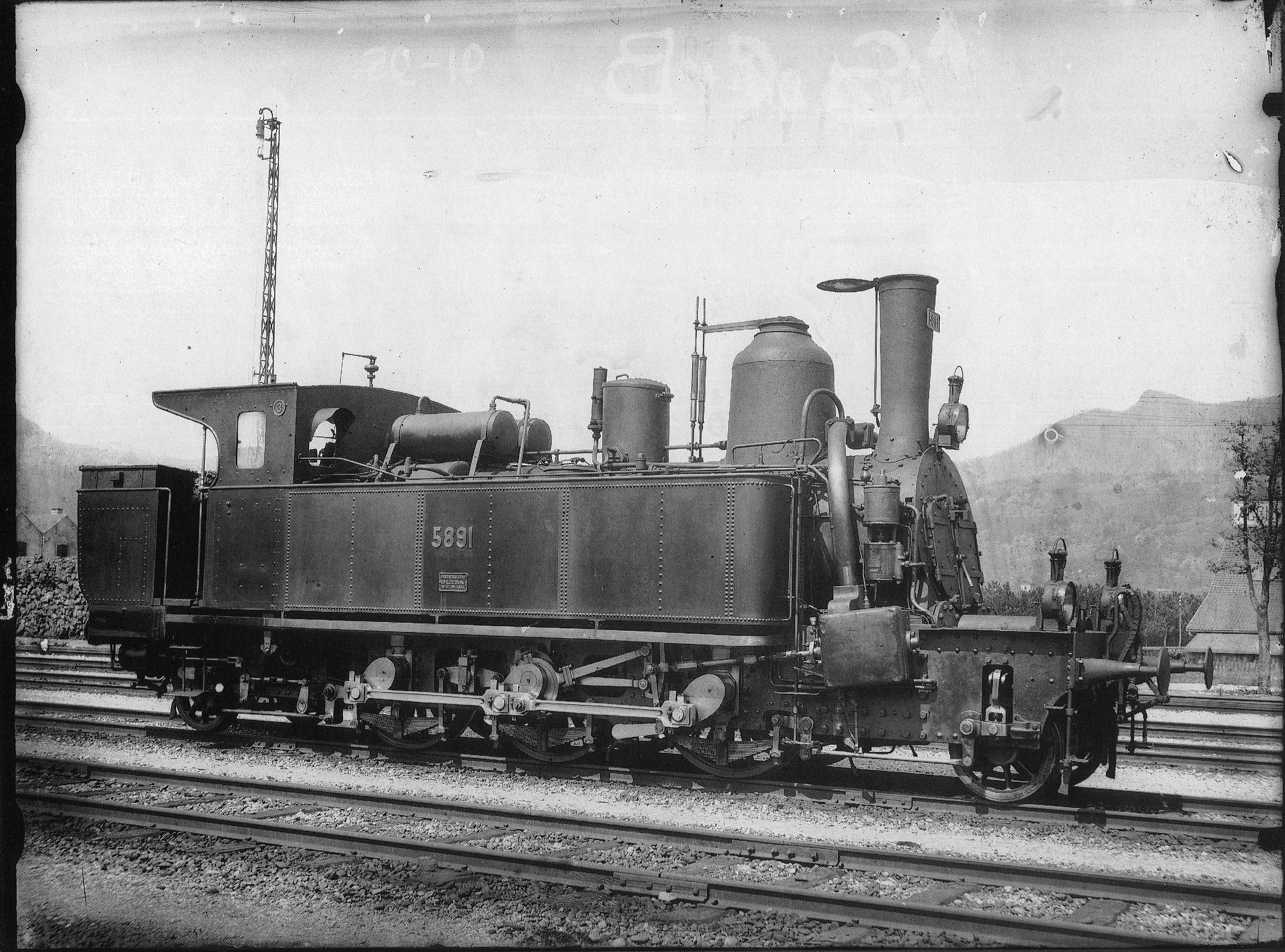 Schnellzuglocomotive Nr. 5891 des Typs Eb 3/5 der Scheizeriſchen Bundesbahnen, vormahls Nr. 95 der Schweizeriſchen Centralbahn, gebaut 1884 inn der deren Hauptwerckſtätte zů Olten (Fabricationsnr. 37), 1900 mit neuem Keſſel ausgeſtattet, 1908 ausrangirt und anſchließend abgebrochen; Aufnahme um 1902.